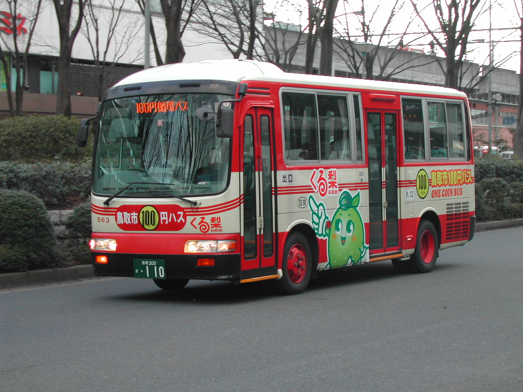 2004-2-15撮影